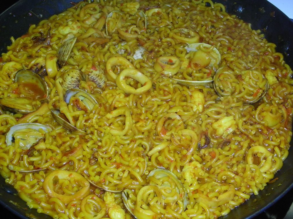 Una paella de fideuà.